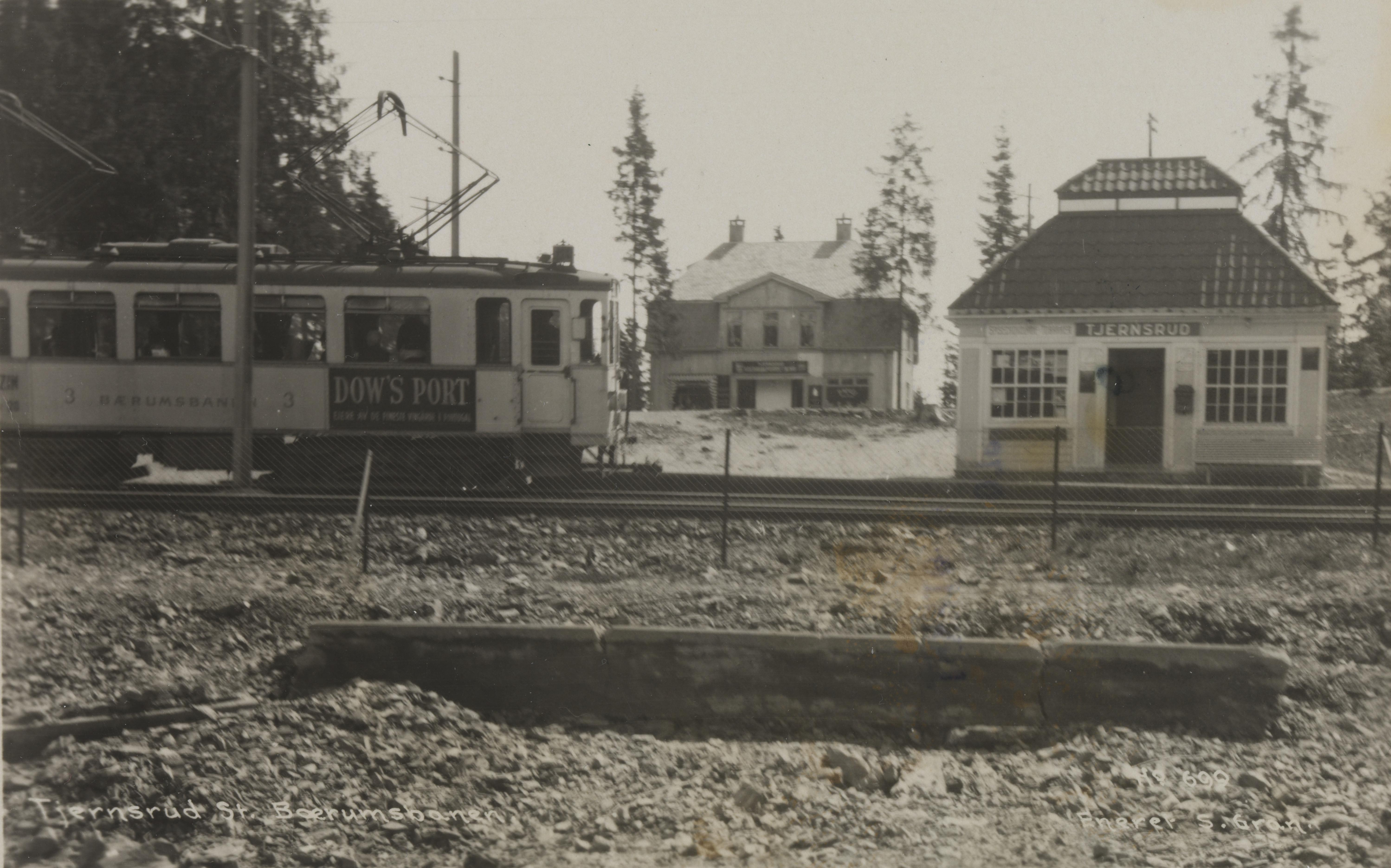 Bildet er hentet fra Nasjonalbibliotekets bildesamling Bærum,Jar,Tjernsrud,Tjernsrud stasjon, Bærum, Akershus